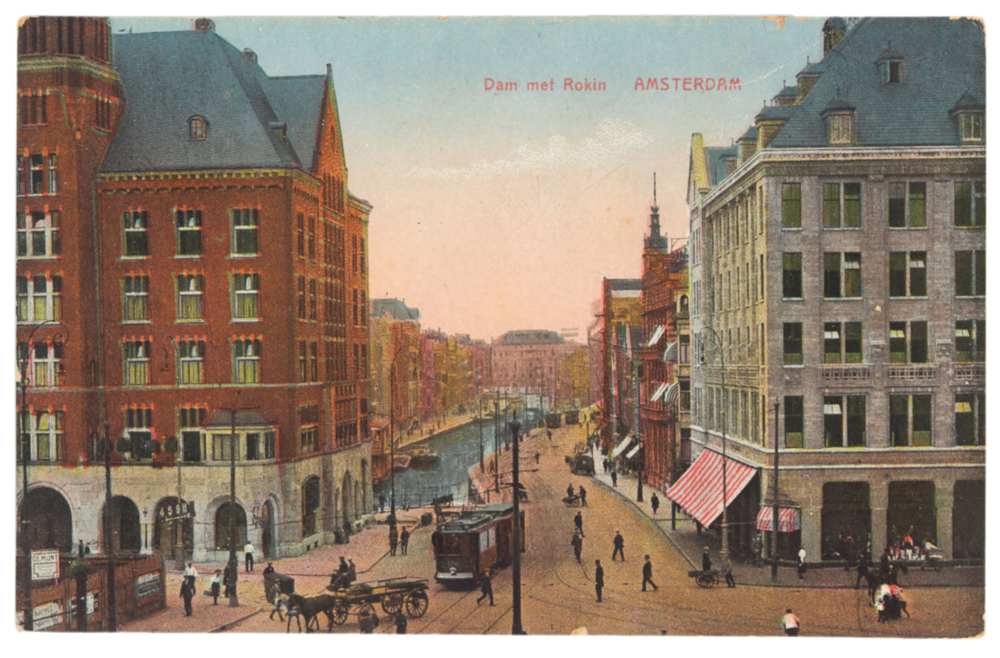 Photographed in Amsterdam after 1912.